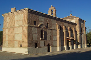 Fachada de la ermita de Nuestra Señora del Pinarejo de Aldeanueva del Codonal (Segovia)